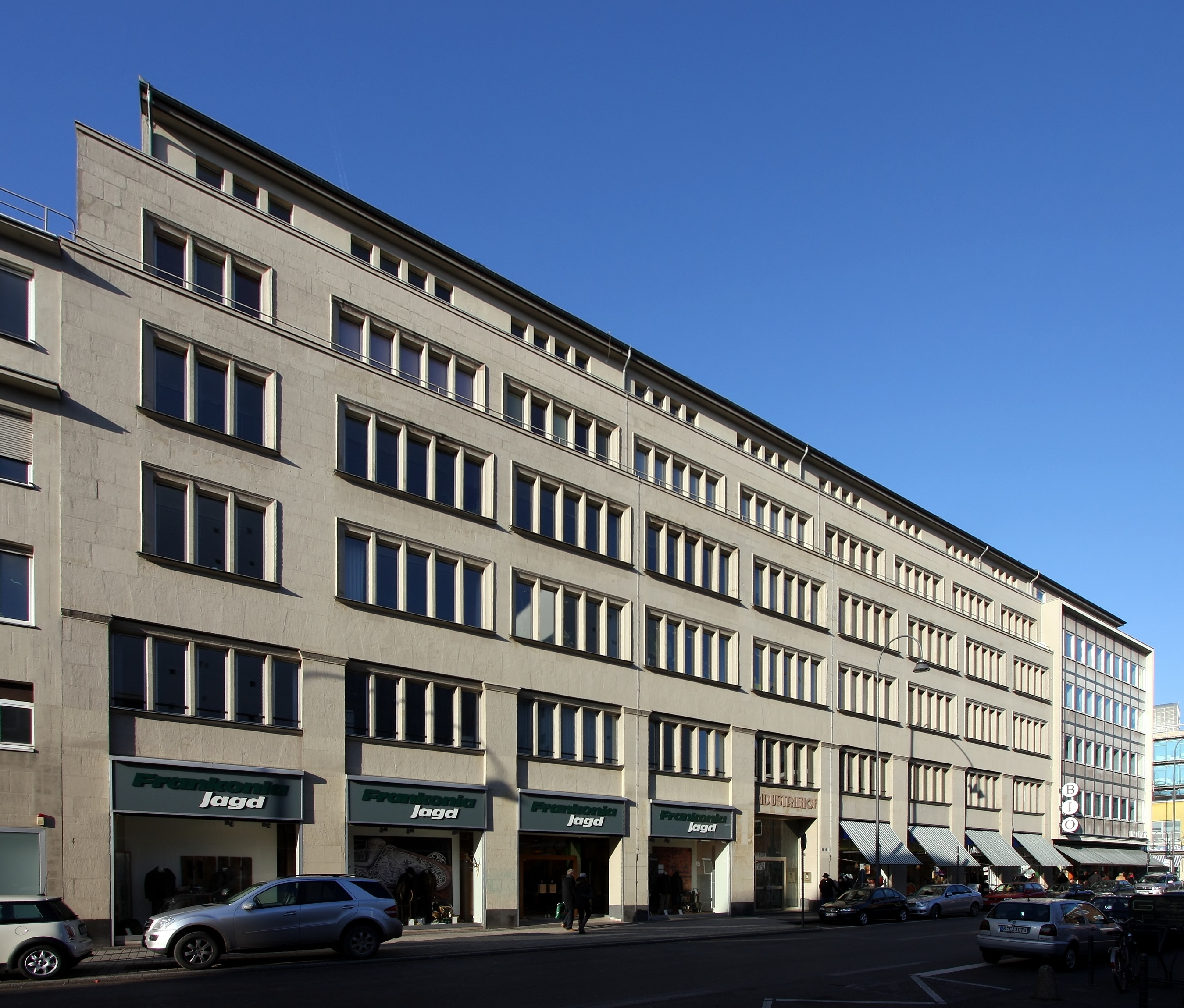 Büro- und Geschäftshaus „Industriehof“, Köln, Krebsgasse 5. Architekt: Jacob Koerfer, Bauzeit: 1922/23